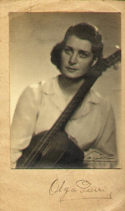 Tarjeta de visita de la guitarrista uruguaya Olga Pierri (1924 - 2016).